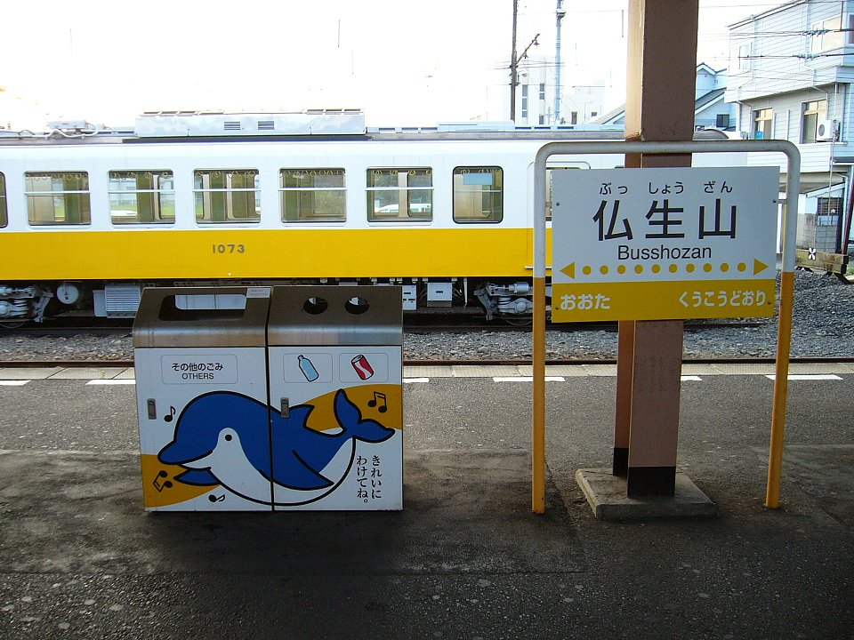 琴電琴平線仏生山駅 新式の駅名標